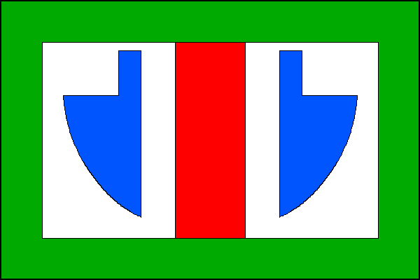 vlajka, Klopina, okres Šumperk